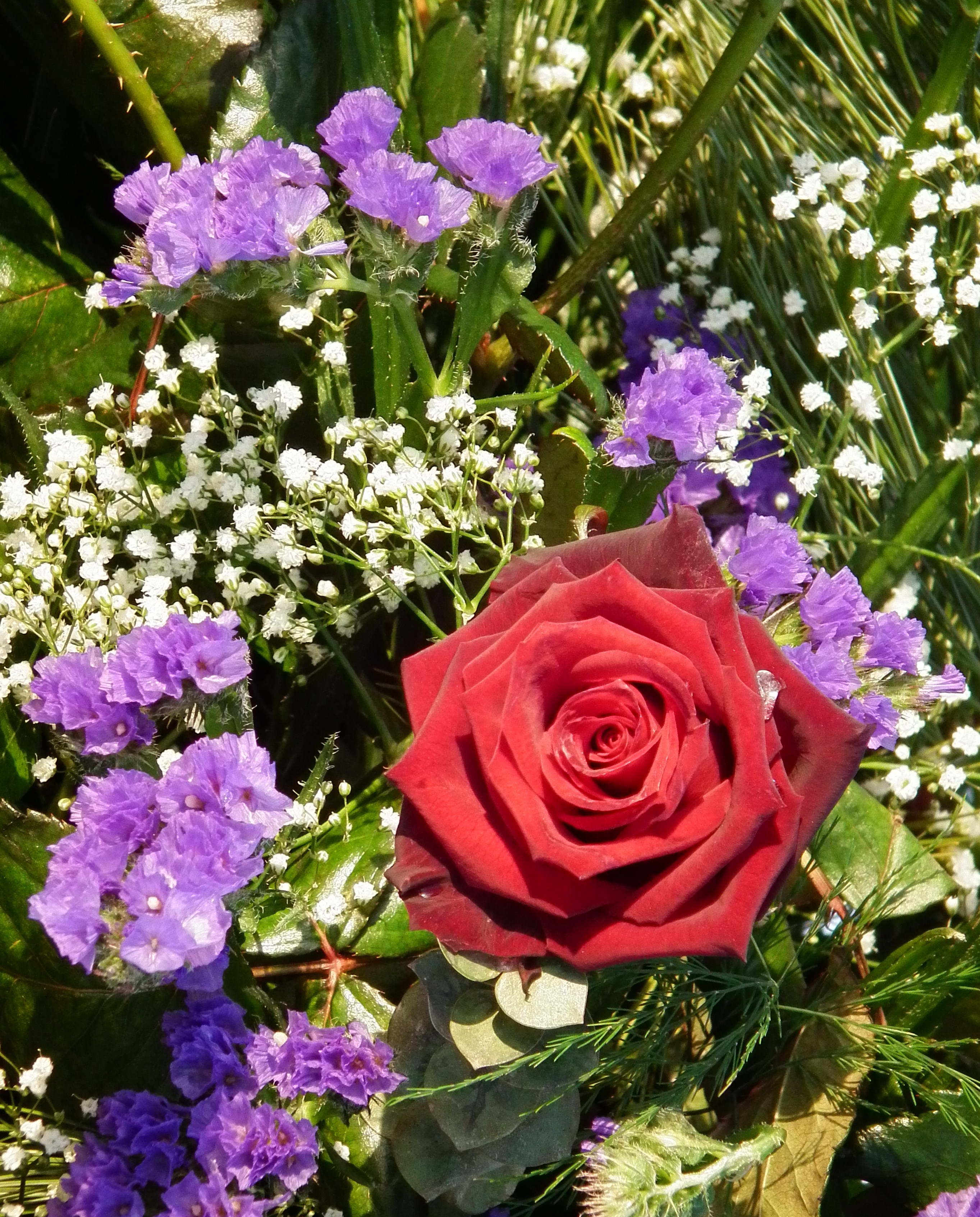 Rote Rose, kombiniert mit Schleierkraut und ?